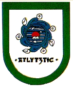 Escudo del municipio de Venustiano Carranza en el estado de Puebla, México